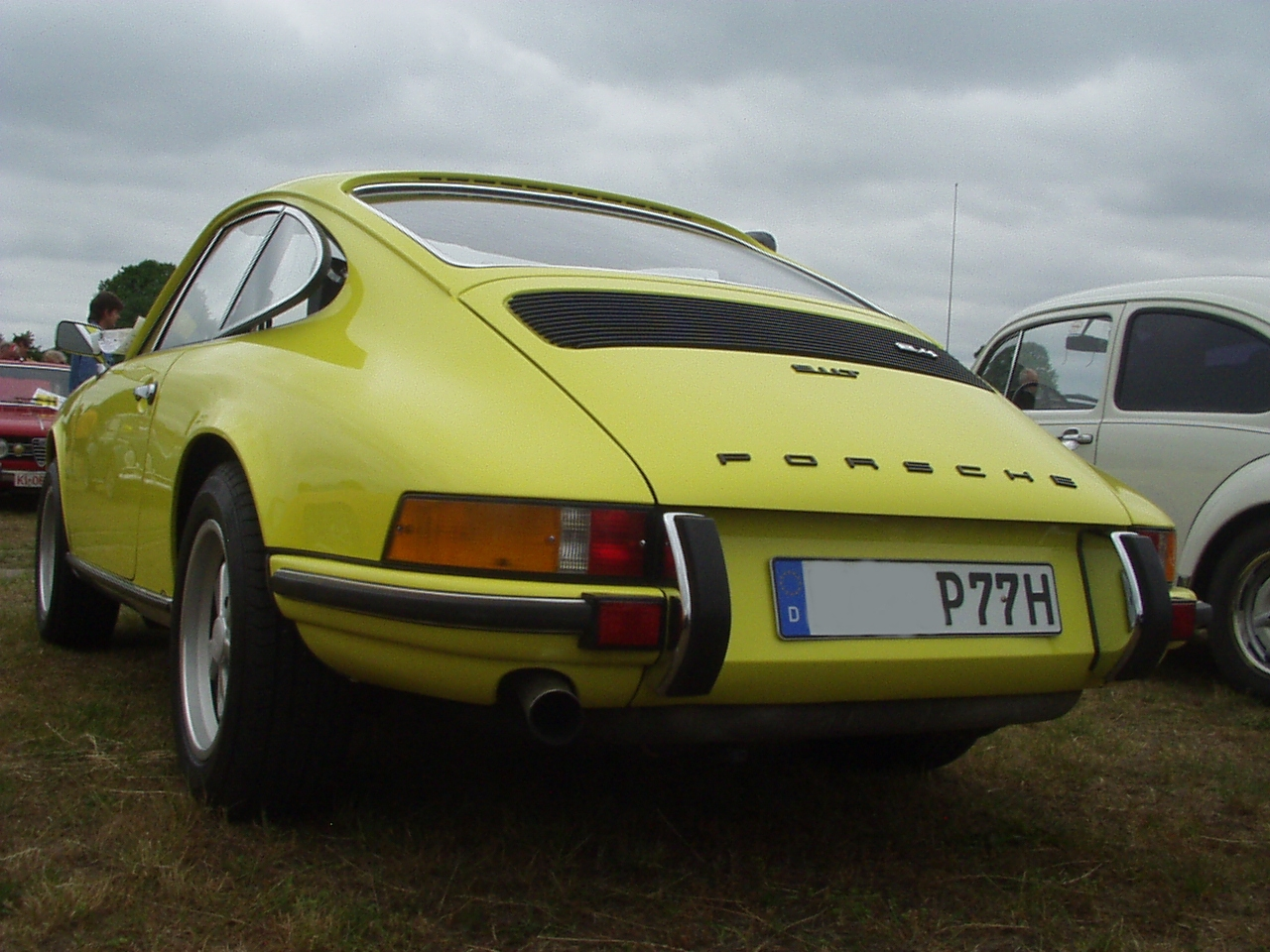 Porsche 911T 2.4 Heckansicht